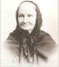 Da. Neofita Augier y Correa de Correa Bulacia, esposa de D. Ramón Rosa Correa.